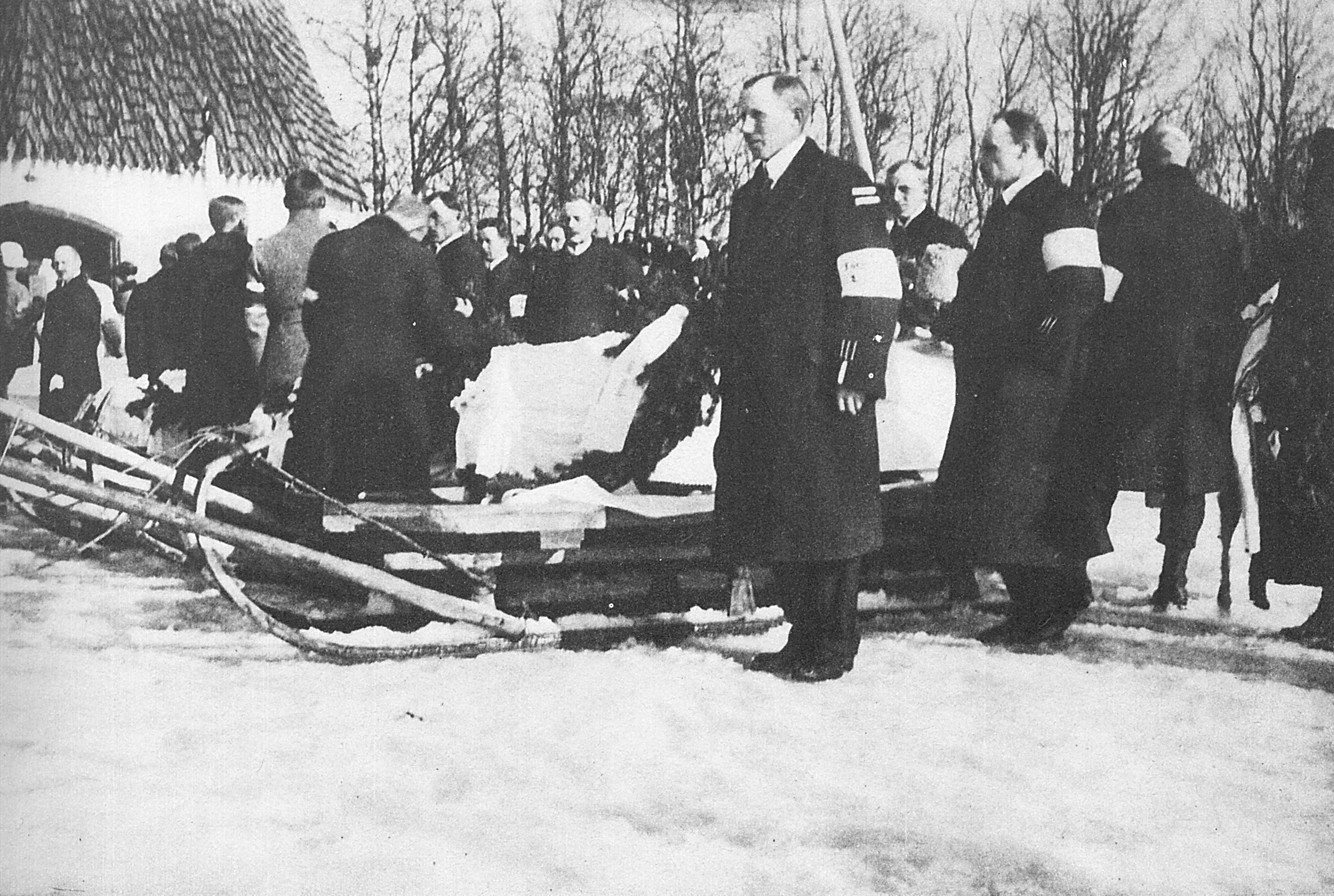 Friedel Jacobsonin viimeinen matka. Tornion kirkko taustalla.